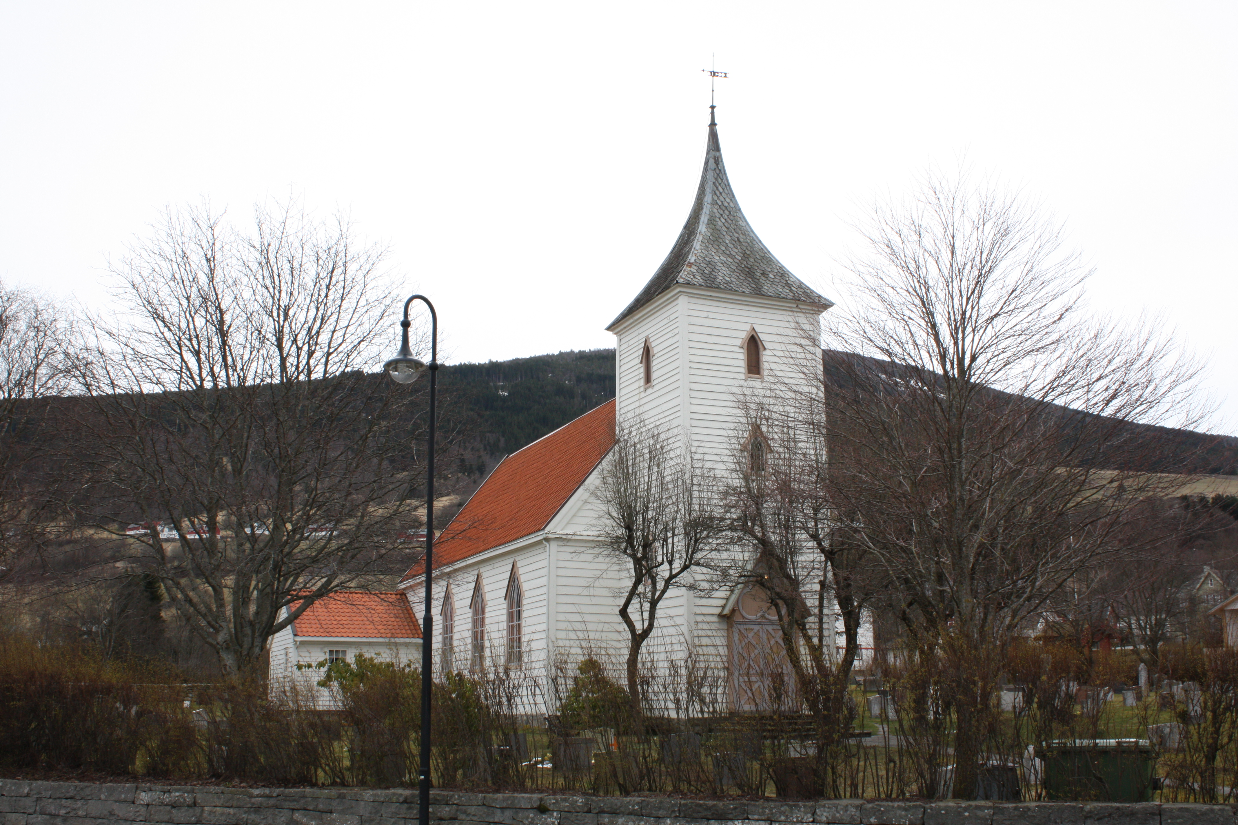 Kirken i Utvik